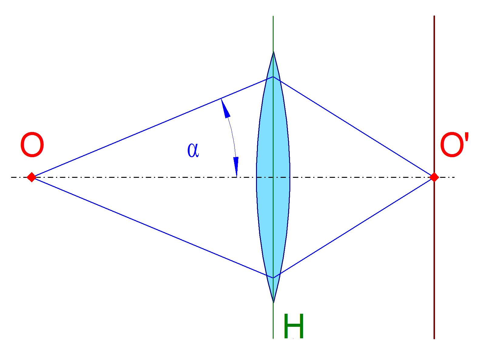 Der halbe objektseitige Öffnungswikel α für die Bestimmung der numerischen Apertur bei einer Abbildung eines Objektpunktes O nach O' an der Hauptebene H einer Feldlinse